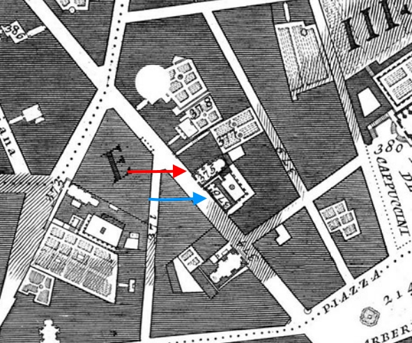 Pianta di Nolli, chiesa di Santa Francesca Romana a Strada Felice